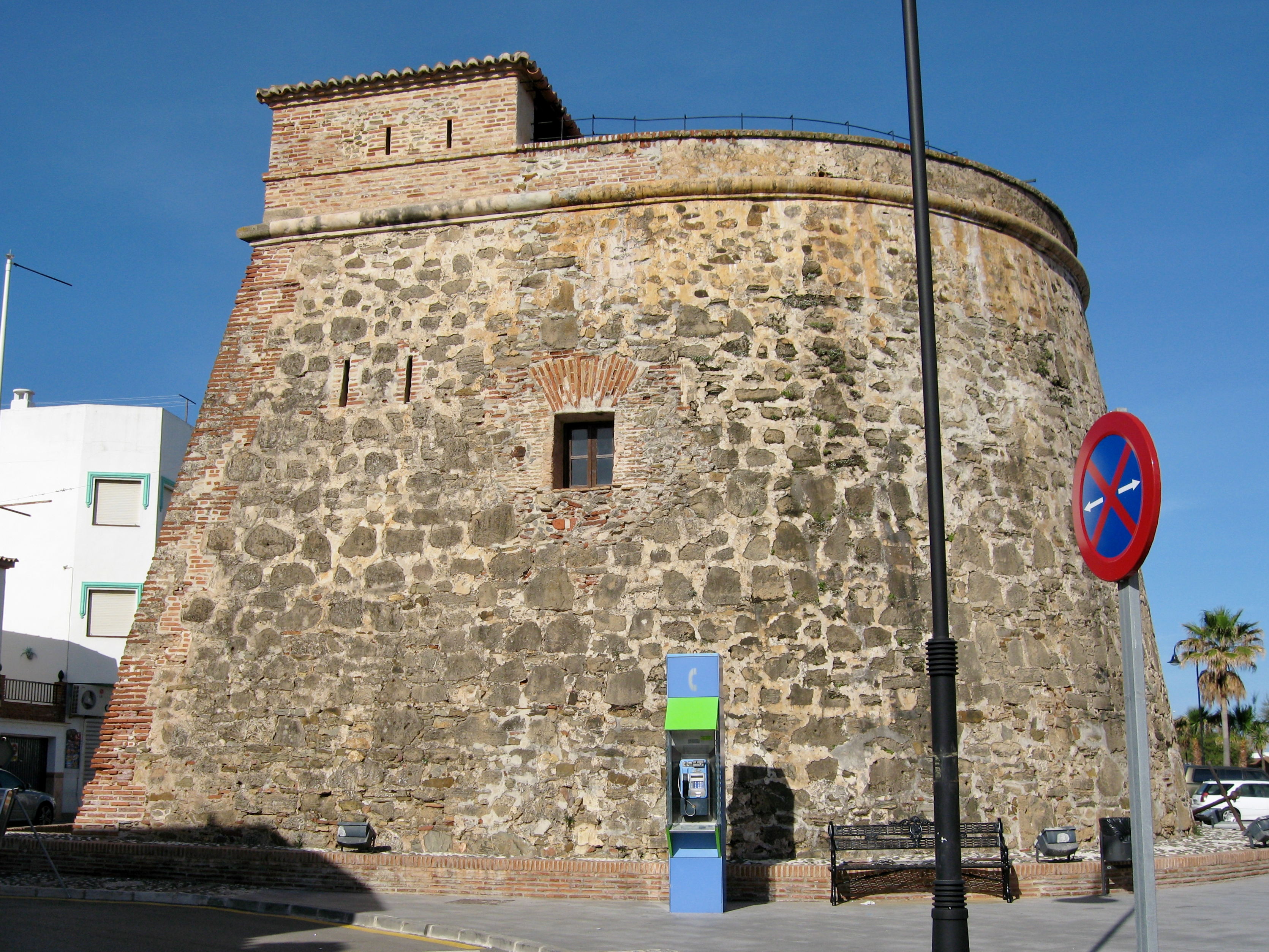 Wachturm (Torres Vigias) von La Cala, Gemeinde Mijas, Provinz Málaga, Andalusien, Spanien